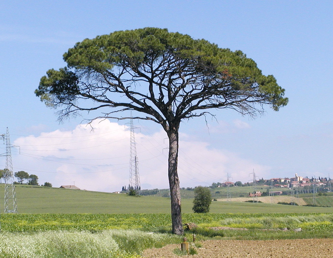 Pinie, Toskana, Italien